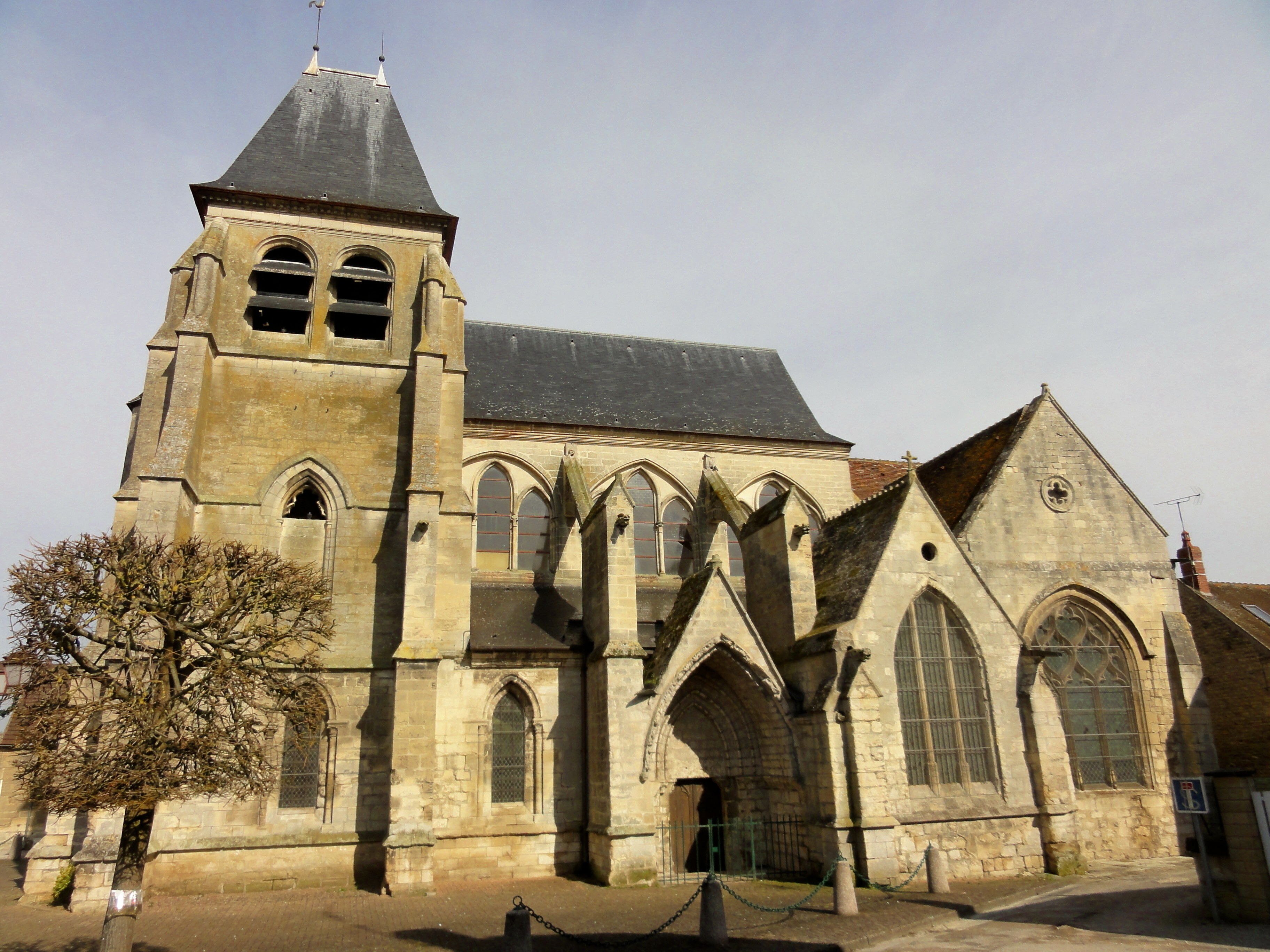 Élévation latérale sud.